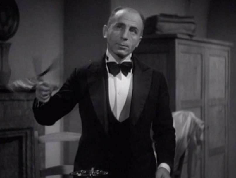 Screenshot dal film Un marito per il mese d'aprile (1941)